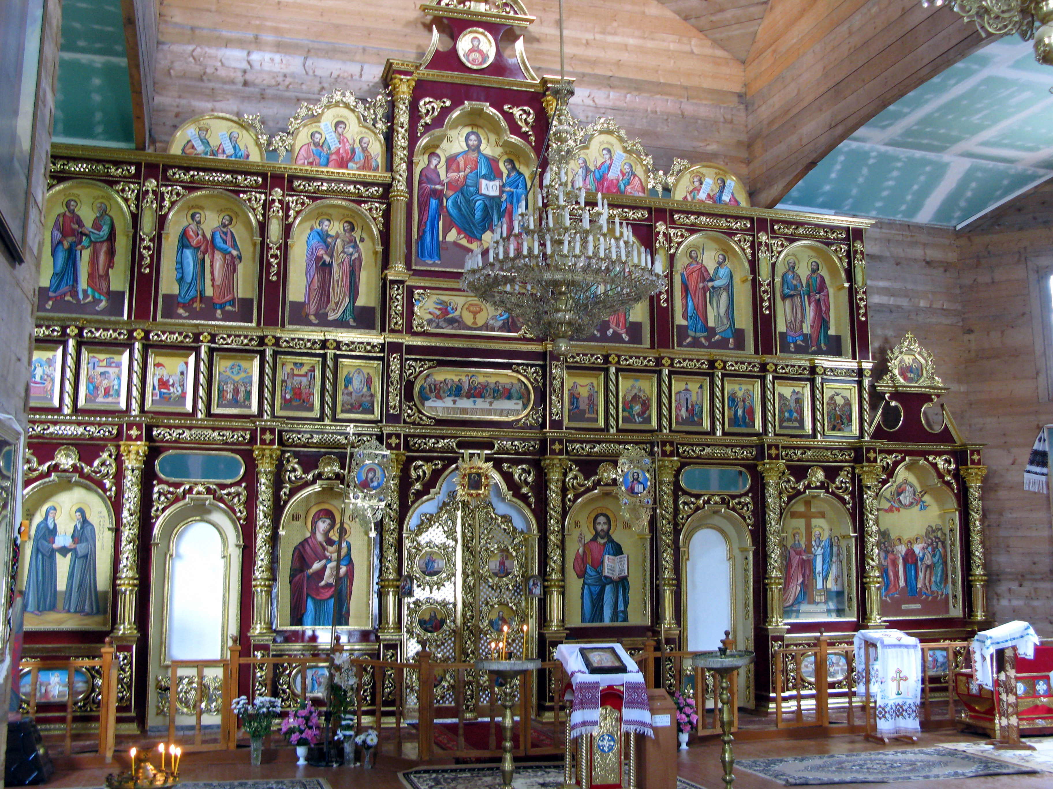 Монастир-скит (мур.):, с. Манява